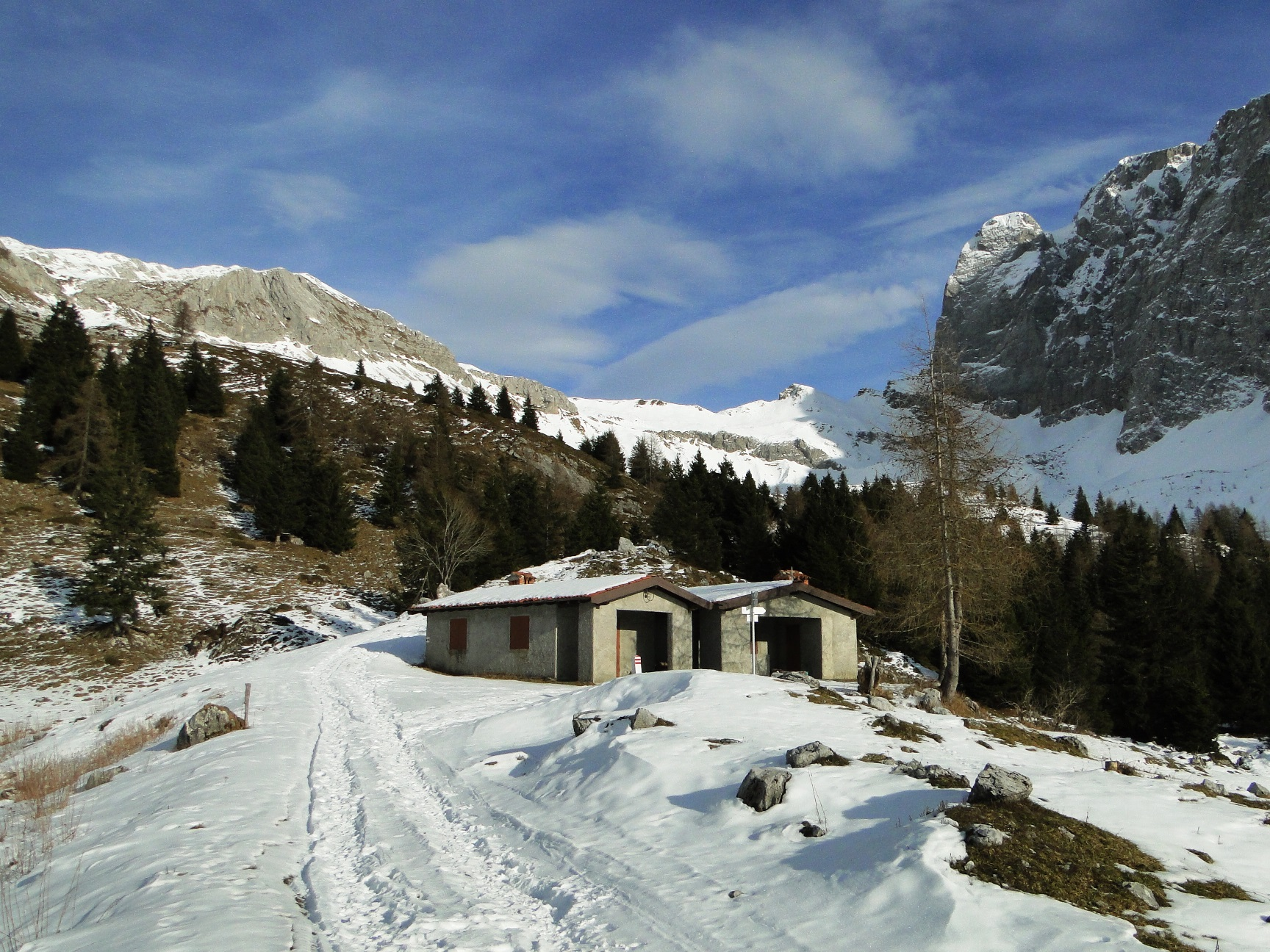 Baita di mezzo di Pagherola. Oltressenda Alta (BG). Italy